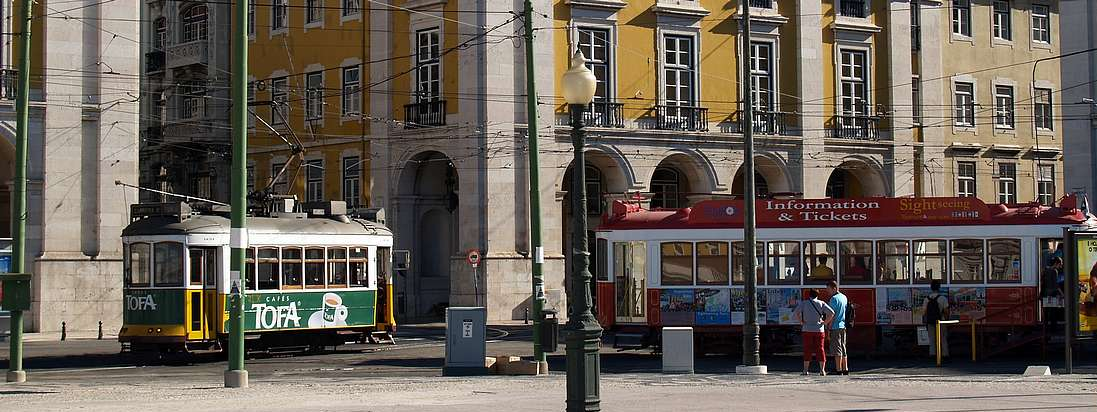 place du commerce (Terreiro do Paço)